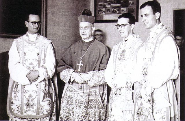 Ordenación de los primeros sacerdotes del Opus Dei: José María Hernández Garnica, Álvaro del Portillo y José Luis Múzquiz